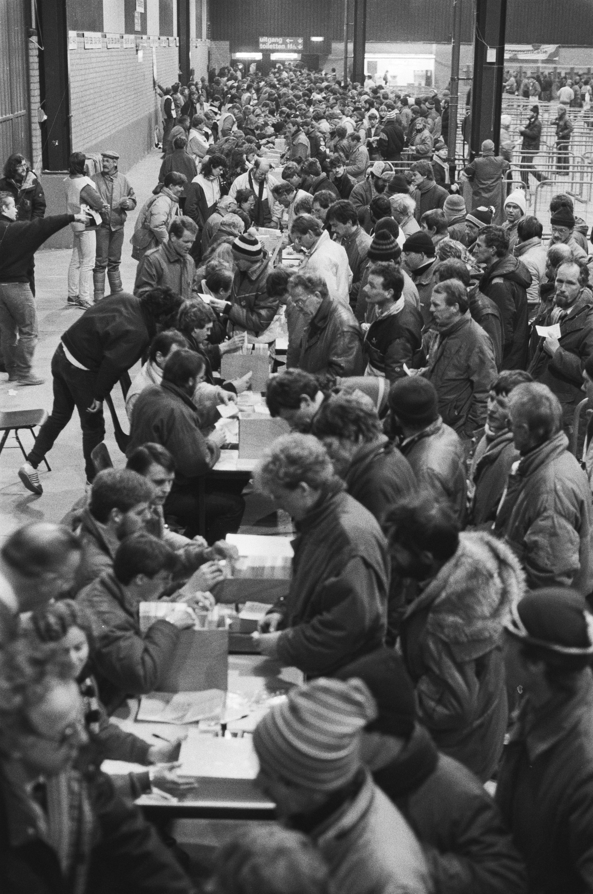 Collectie / Archief : Fotocollectie Anefo Reportage / Serie : Elfstedentocht 1986 Beschrijving : Inschrijving 14e Elfstedentocht: de inschrijving verliep betrekkelijk soepel Datum : 25 februari 1986 Locatie : Friesland, Leeuwarden Trefwoorden : beurzen, gebouwen, marathonschaatsen Fotograaf : Croes, Rob C. / Anefo, [onbekend] Auteursrechthebbende : Nationaal Archief Materiaalsoort : Negatief (zwart/wit) Nummer archiefinventaris : bekijk toegang 2.24.01.05 Bestanddeelnummer : 933-5782